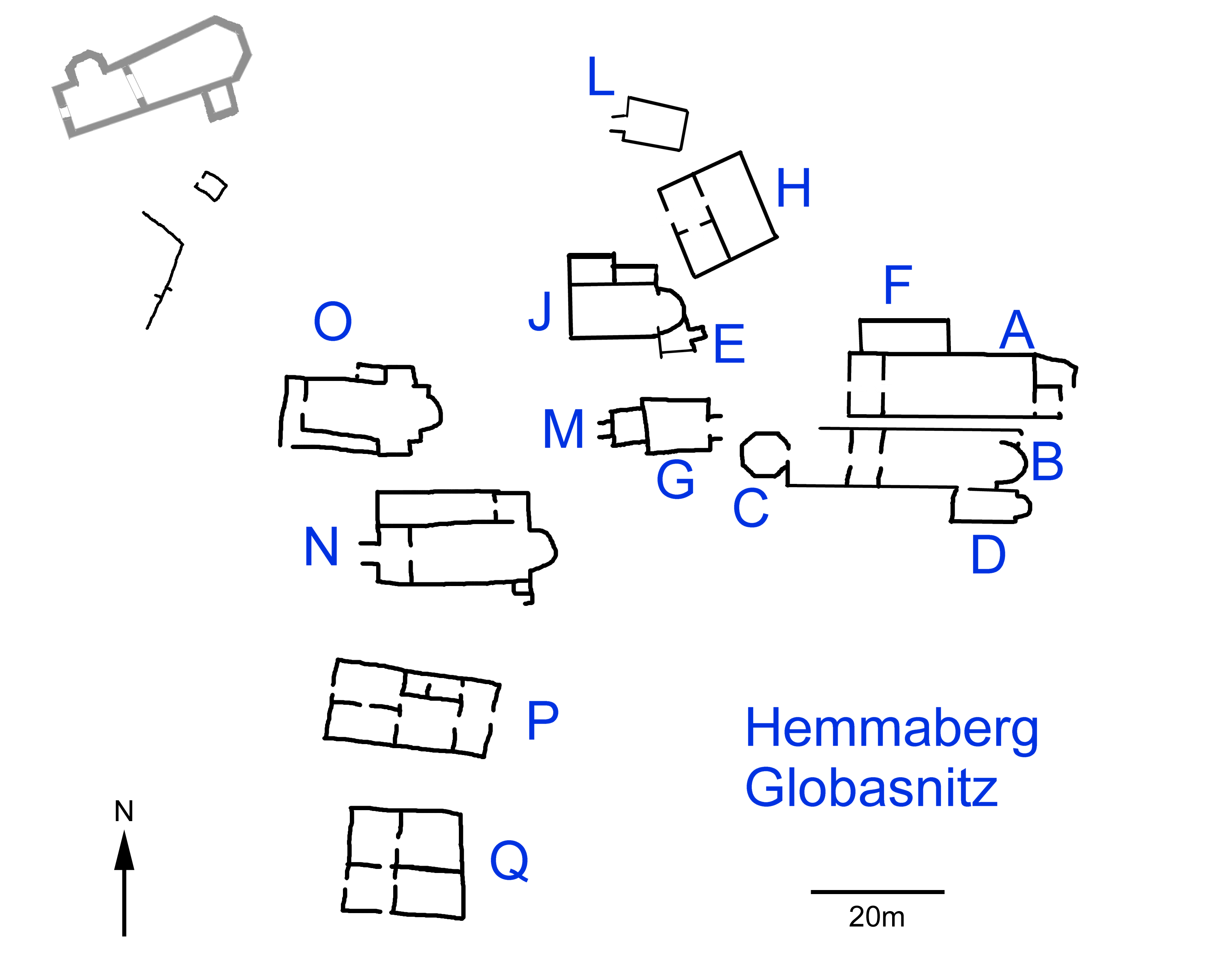 Lageplan der Gebäude am Hemmaberg/Globasnitz/Kärnten// Map of Buildings on Hemmaberg, Globasnitz, Carinthia. Östliche Doppelkirche: A Gemeindekirche, B Memorialkirche, C Baptisterium, D Grabkapelle, F Zisterne; Westliche Doppelkirche: N Gemeindekirche, O Taufkirche; J erste Kirche, E Grabraum, K Zisterne; G Gebäude mit M Anbau; H Pilgerhaus; L, O, P Gebäude.